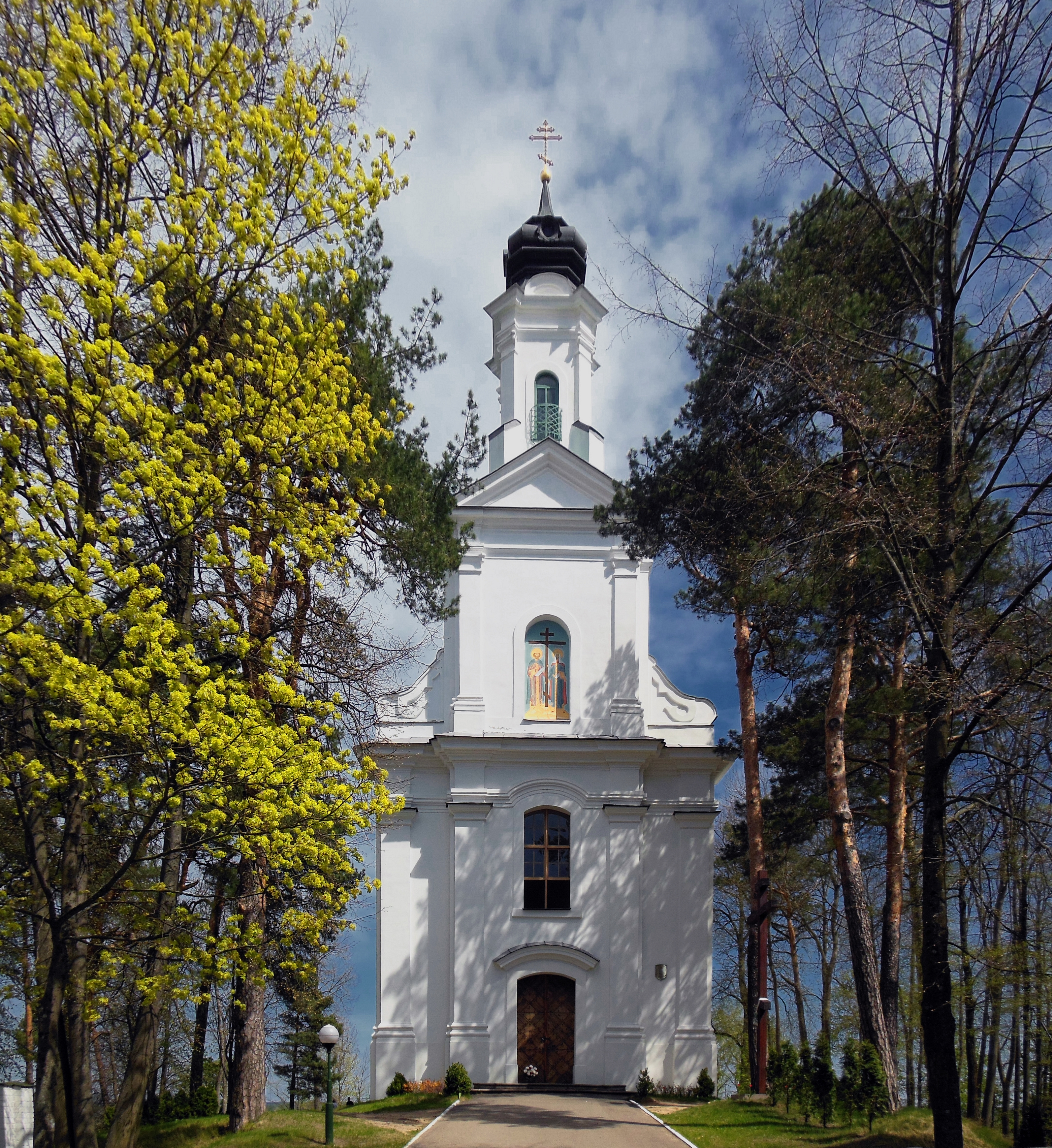 Беларуская (тарашкевіца): Ансамбаль Сьвята-Усьпенскага манастыра: Усьпенскі сабор дэкаратыўнае аздабленьне: росьпіс у консе «Спас Пантакратар», арнамэнтальны дэкор на скляпеньнях паўднёвай сакрысьціі і ўсіх нэфаў, іканастас, бакавыя алтары Богаяўленская царква Крыжаўзьвіжанская царква званіца будынак сэмінарыі жылы корпус гаспадарчыя пабудовы. в. Жыровічы This is a photo of Belarusian heritage monument. Reference number: 411Г000537 ( WLM)